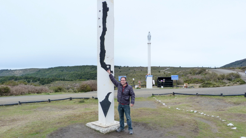 Mapa que muestra la mitad de Chile si consideramos la frontera norte con Perú y el sur con la Antártica.